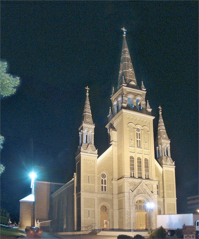 Cathédrale Saint-Charles-Borromée, Joliette, Lanaudière, Québec, Canada.